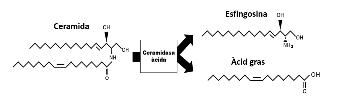 La imatge representa la funció principal de la ceramidasa àcida: la hidròlisi de la ceramida en esfingosina i un àcid gras. Basada en la Figura 2 de l'article Acid ceramidase deficiency: Farber disease and SMA-PME (